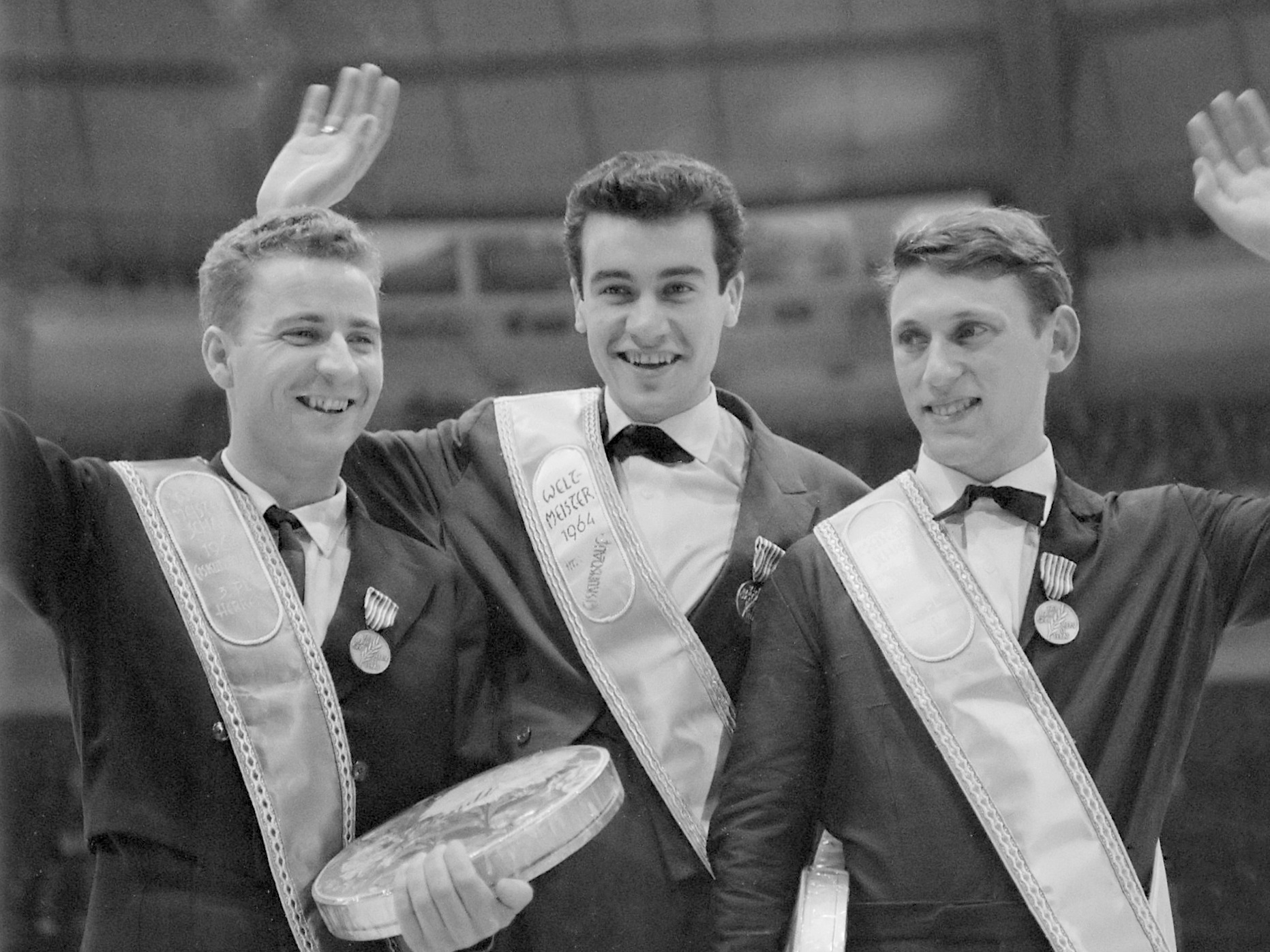 Wereldkampioenschappen kunstrijden te Dortmund, op ereprodium v.l.n.r. Karol Divin (Tsjechoslowakije), Manfred Schnelldorfer en Alain Calmat 29-2-1964